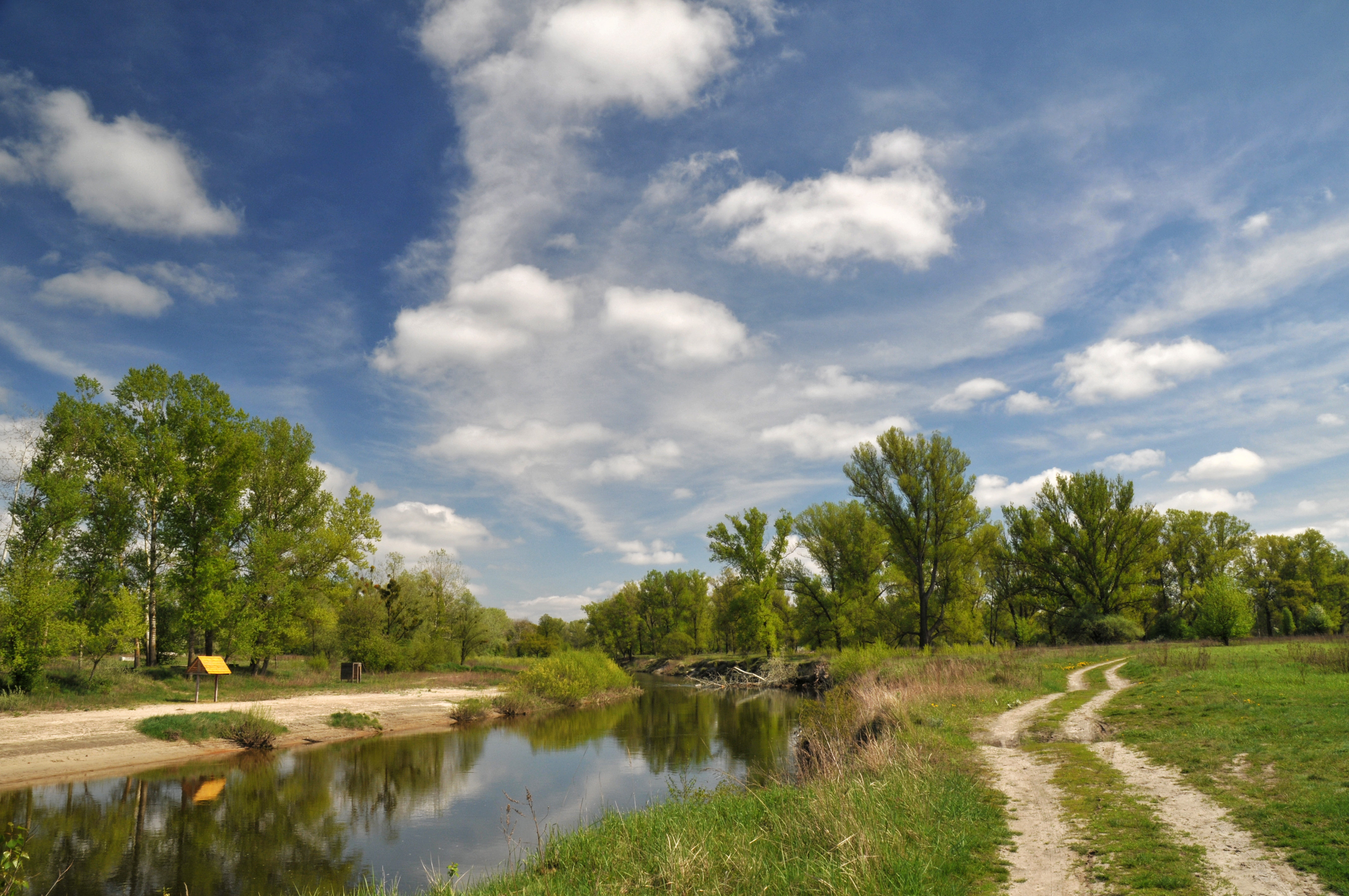 РЛП "Диканський". р.Ворскла поблизу с.Михайлівка